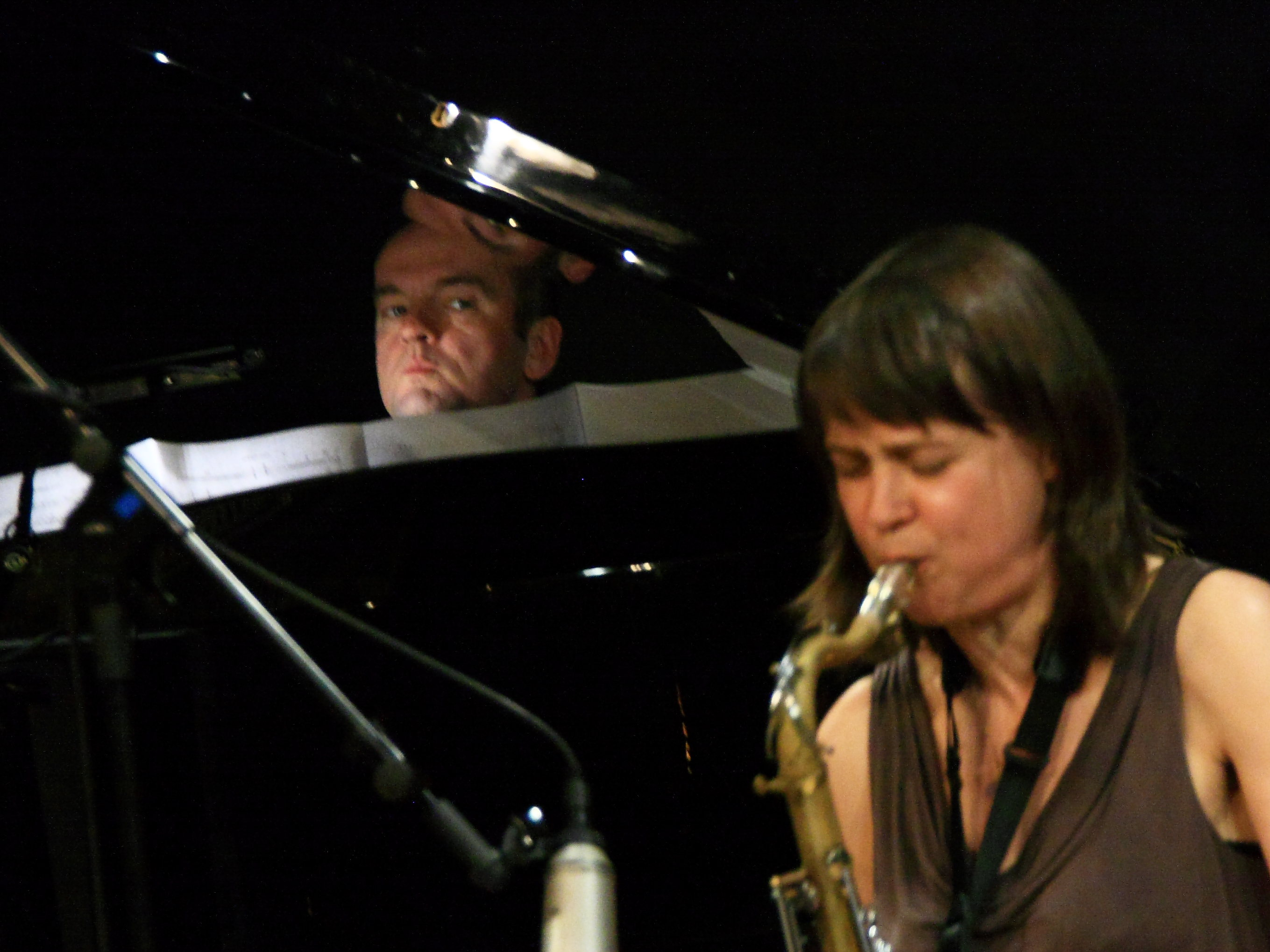 Liam Noble mit dem Ingrid Laubrock Octet im Kult, Niederstetten.